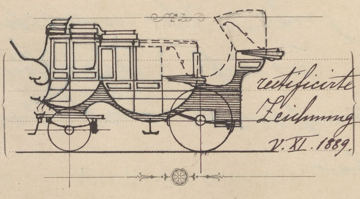 Prüfbericht der Schweizerischen Postverwaltung zur Genehmigung einer Postkutsche